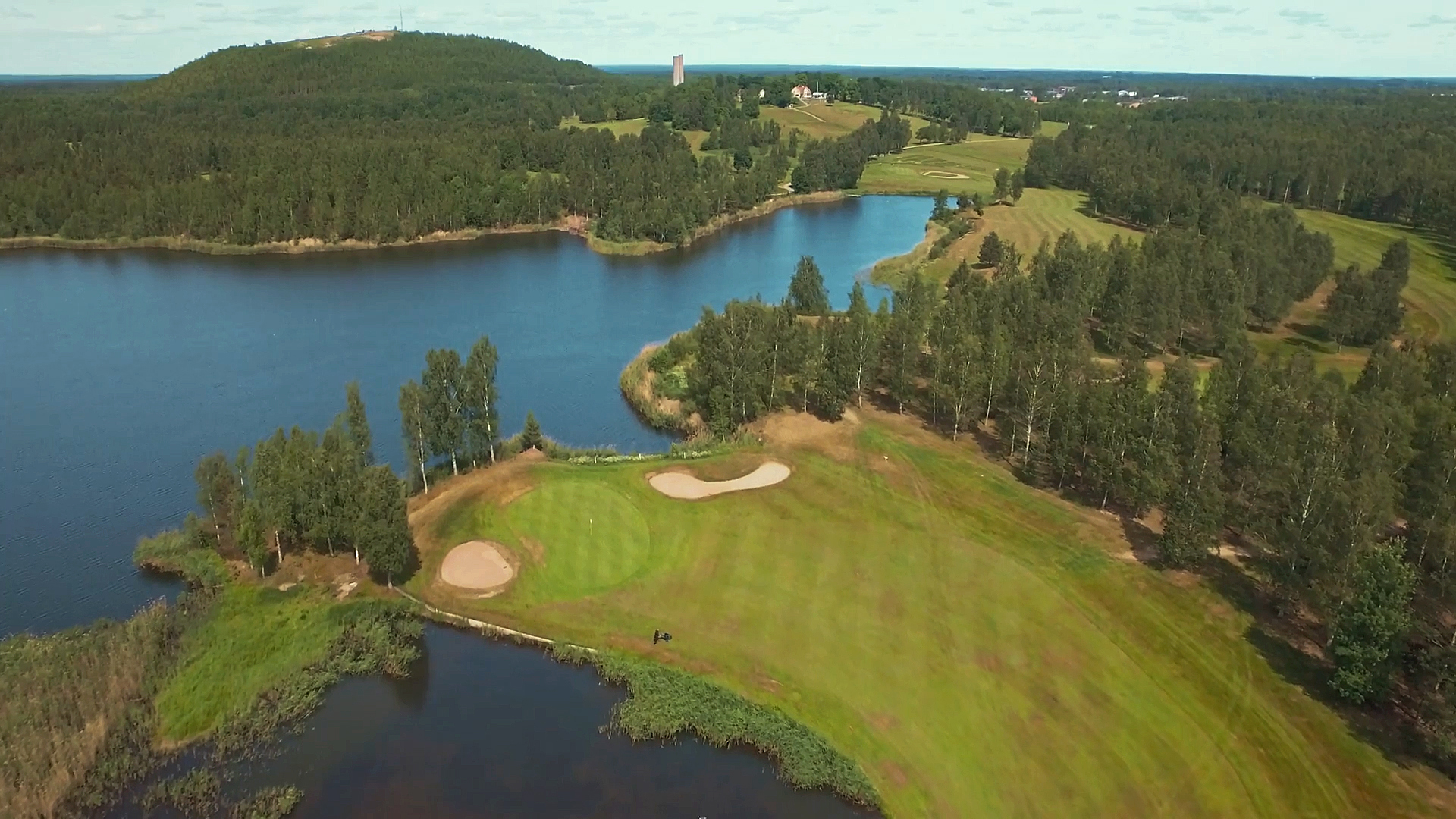 frilufts område